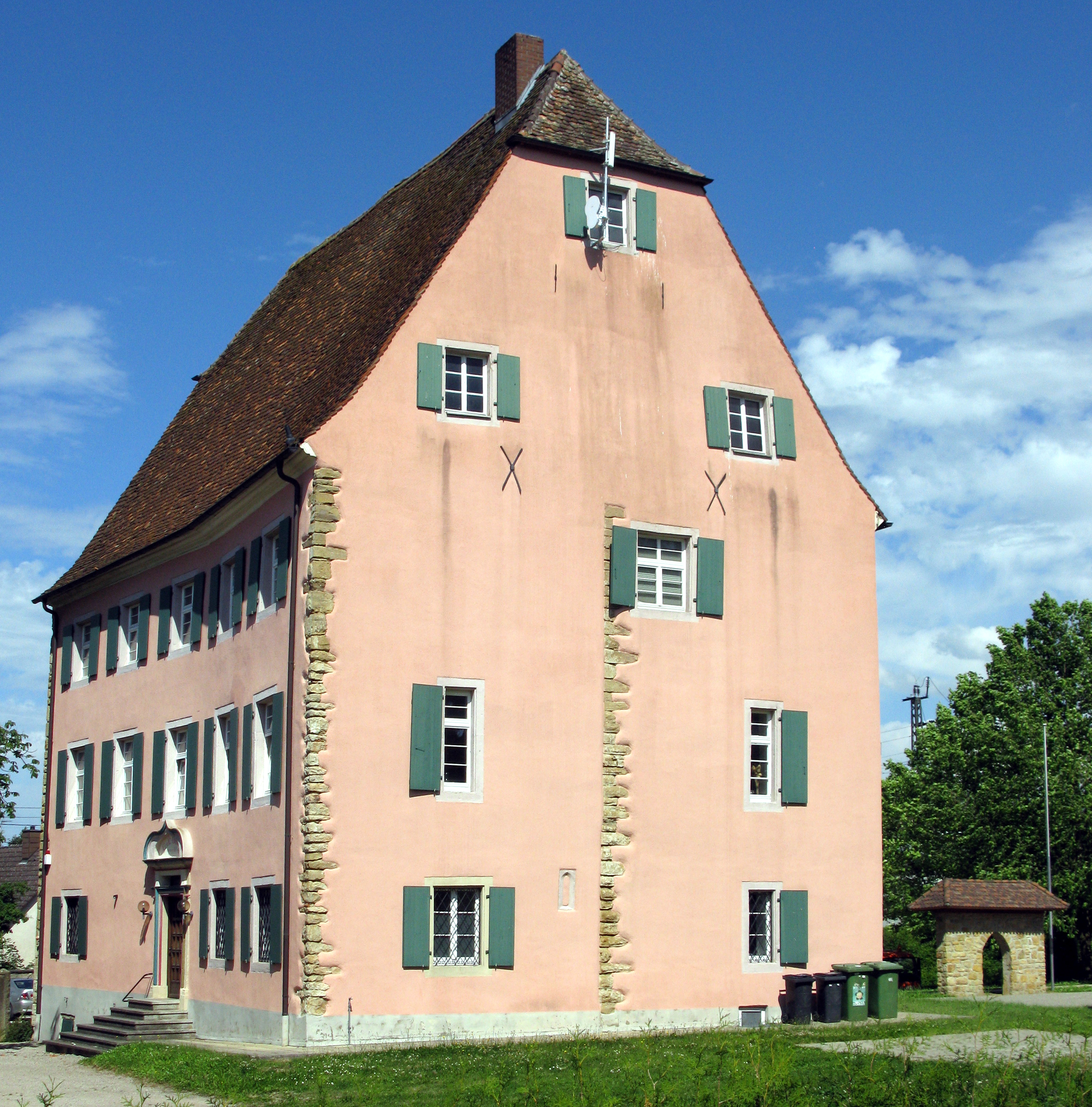 Eschbacher Castell, die Umrisse des Turmes als Ursprung des Gebäudes sind mit Steinquadern markiert.